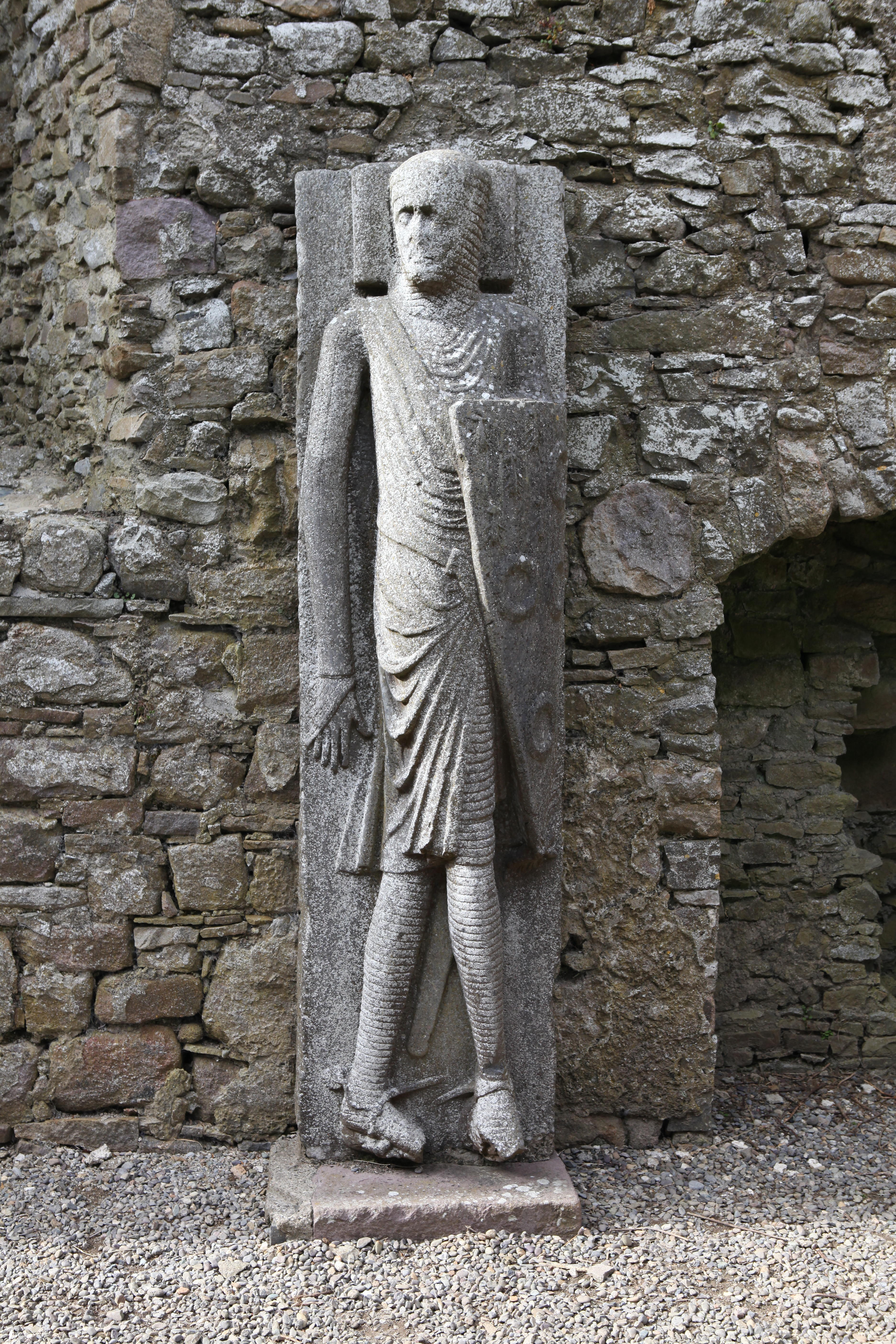 der lange Mann von Kilfane